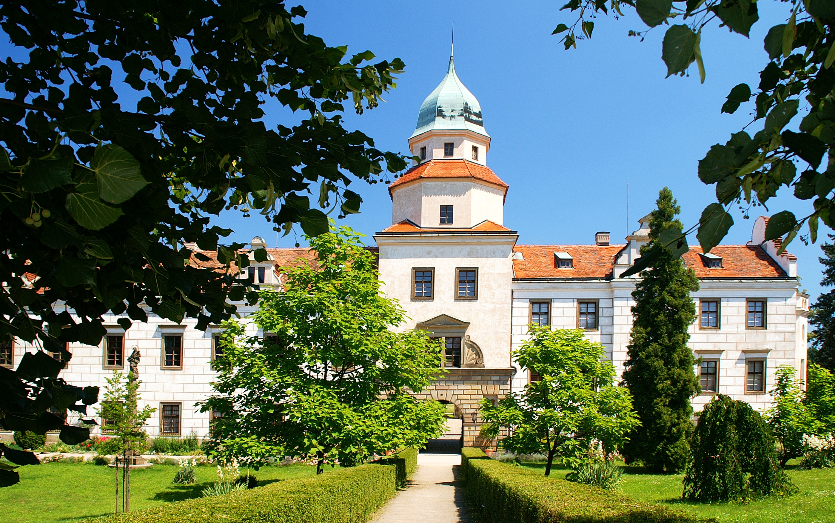 Zámek v Častolovicích u Rychnova nad Kněžnou.